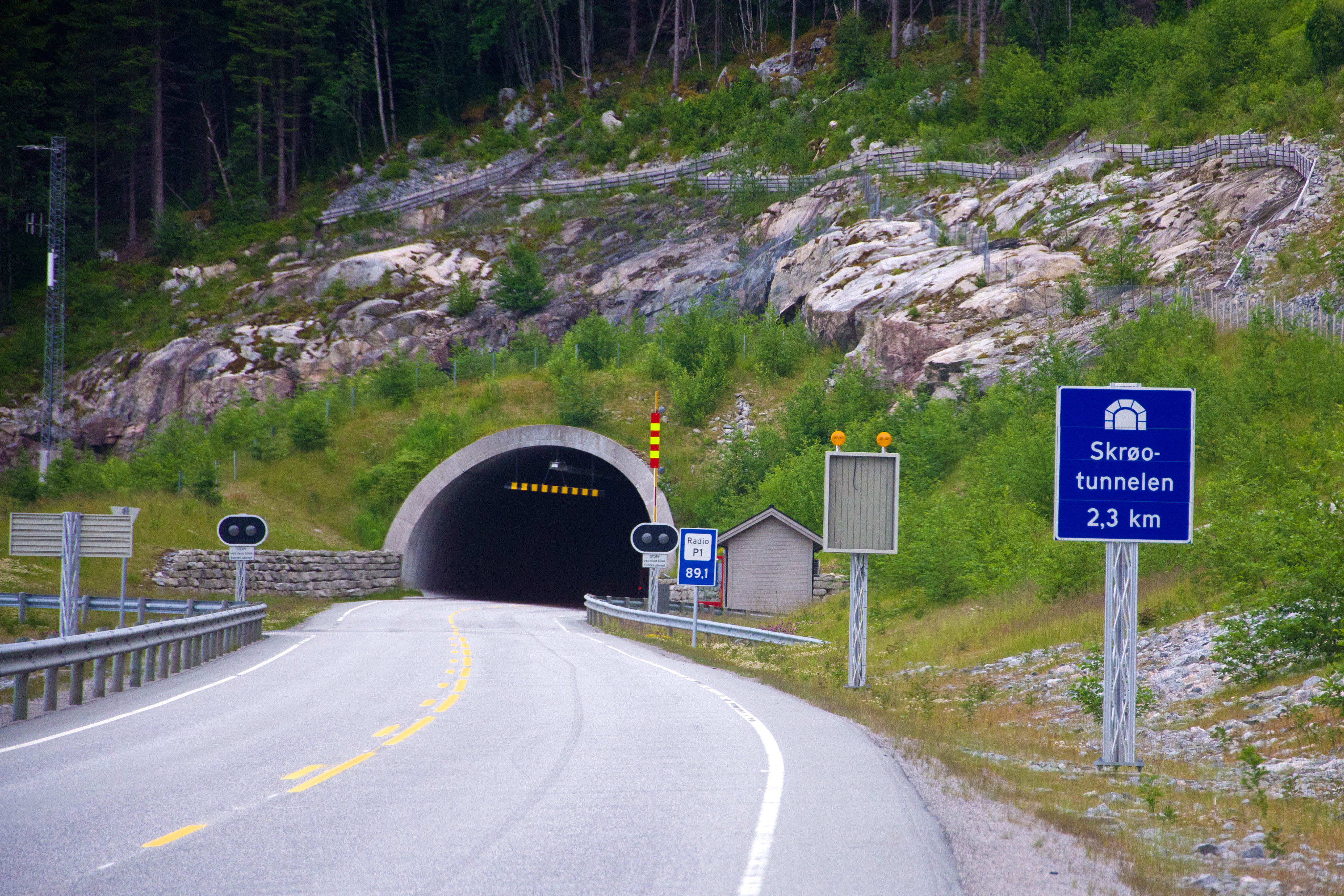 Skrøotunnelens vestre innslag på fylkesvei 62 i Møre og Romsdal.